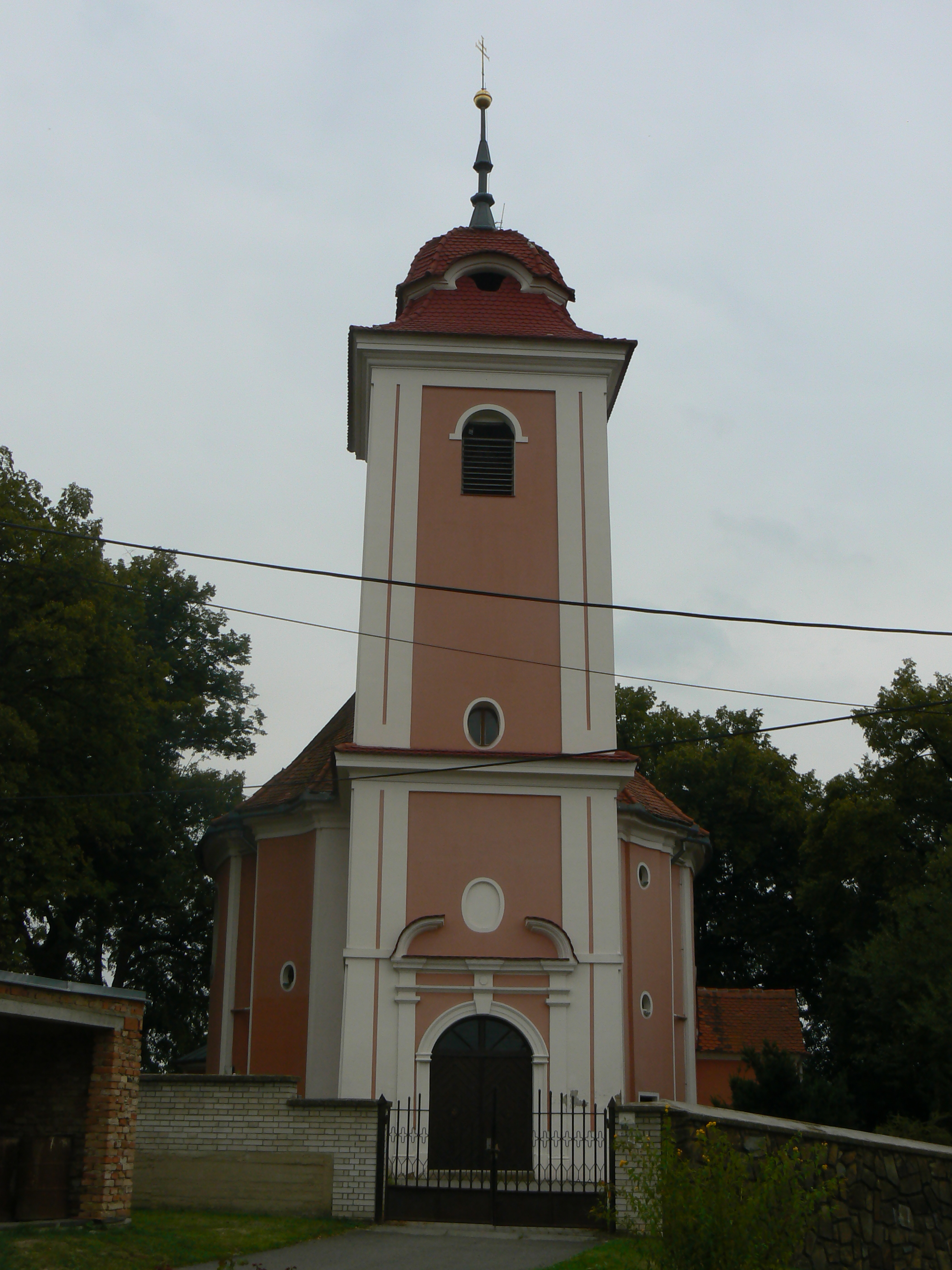 Kostel sv. Mikuláše, Brankovice.